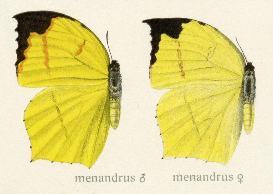 Dercas verhuelli menandrus